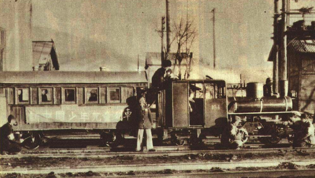 1952年东北铁路总局 博克图机务组构建新中国少年儿童机车